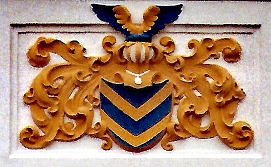 Plessing'sches Familien-Wappen am Morier-Hof